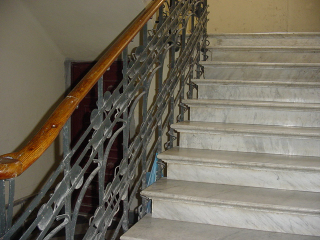 Ringhiera floreale originale, di Palazzo Bonanni a Carrara